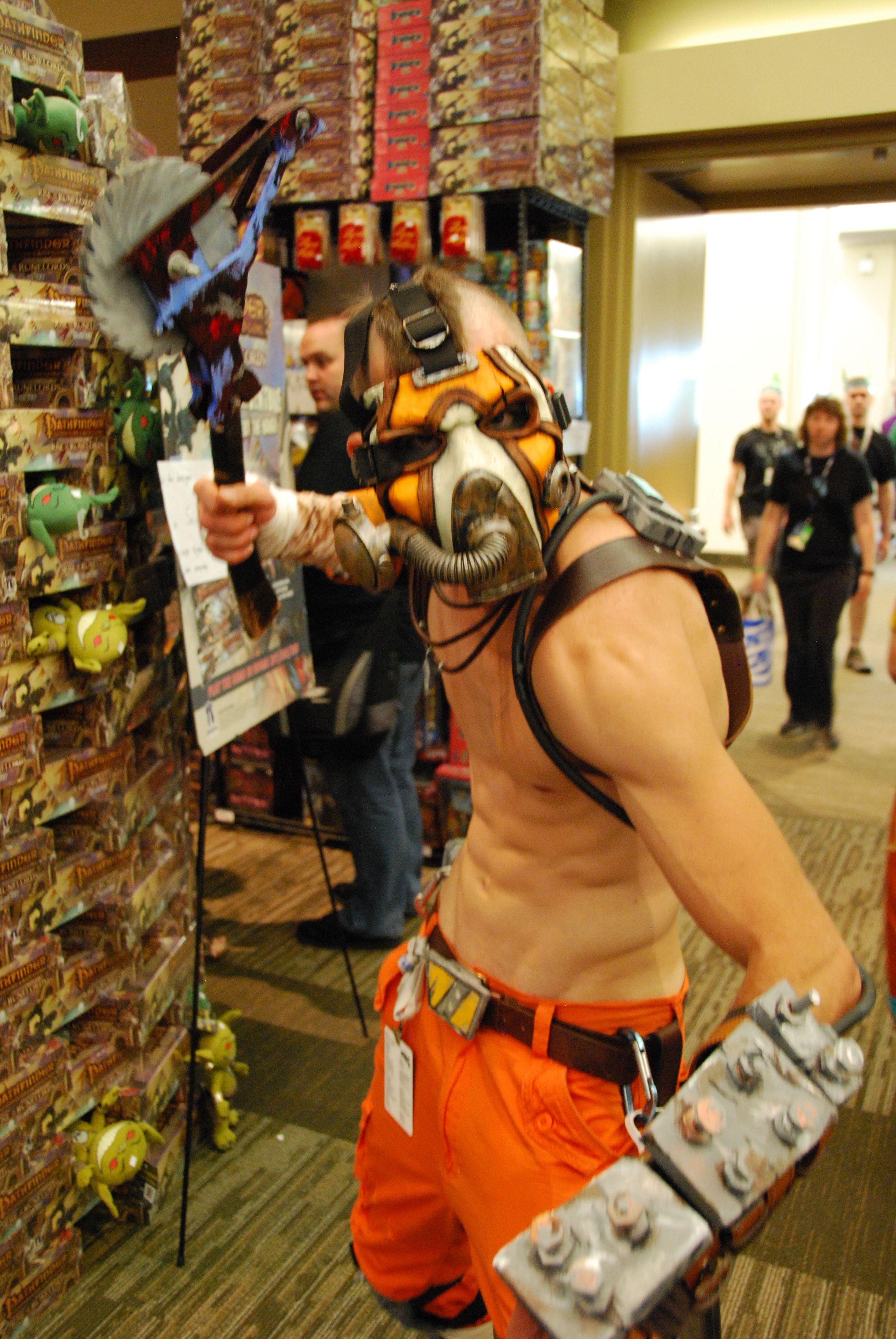 Borderlands 2